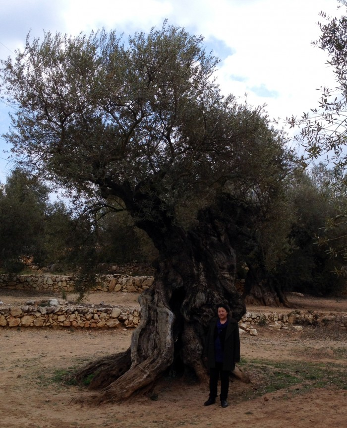 Olivera mil·lenària a la partida de l'Arión, a Ulldecona.